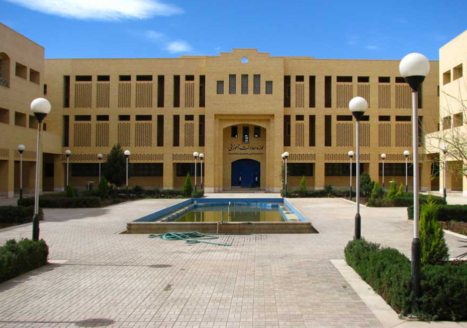 Innenhof der Universität Yazd. (Übernahme von der iranischen Wikipedia.)